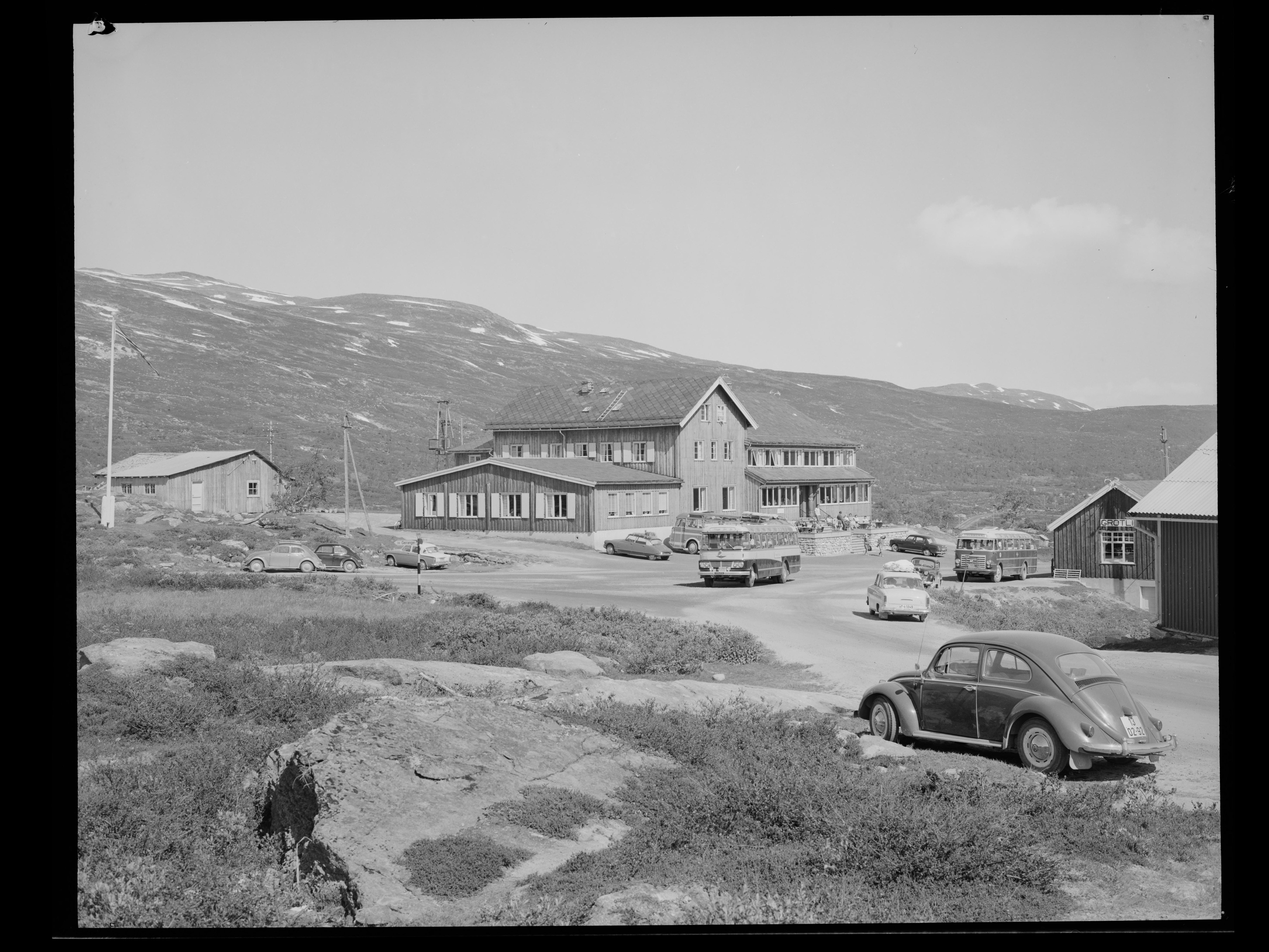 Bildet er hentet fra Nasjonalbibliotekets bildesamling. Anmerkninger til bildet var: fotograf: Å.M. Grotli, Skjåk, Oppland